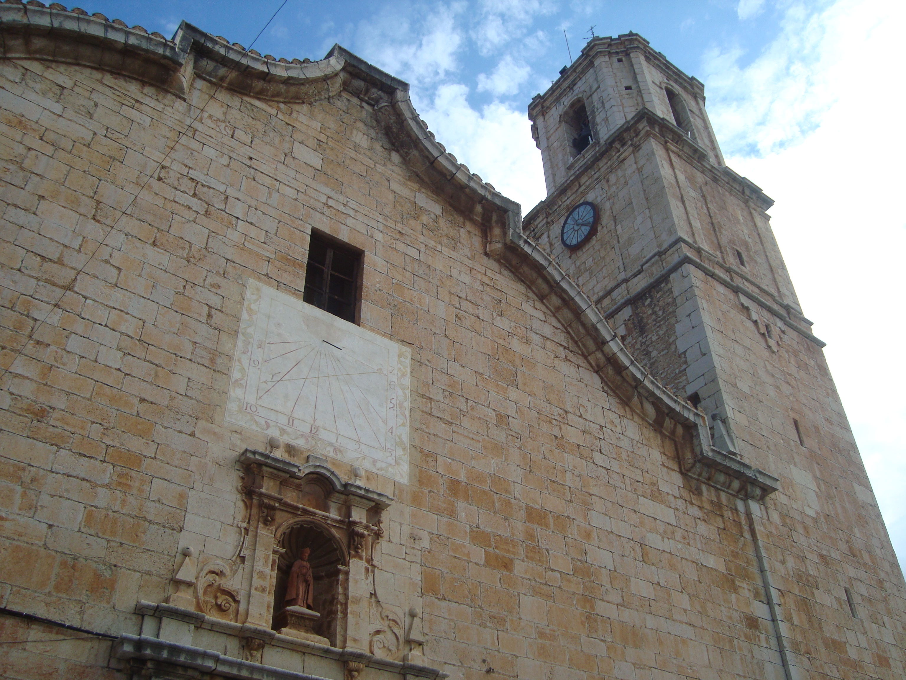 Església parroquial de la Purificació de Maria (La Salzadella)Iglesia Parroquial Purificación de la Virgen María 03.098-001.